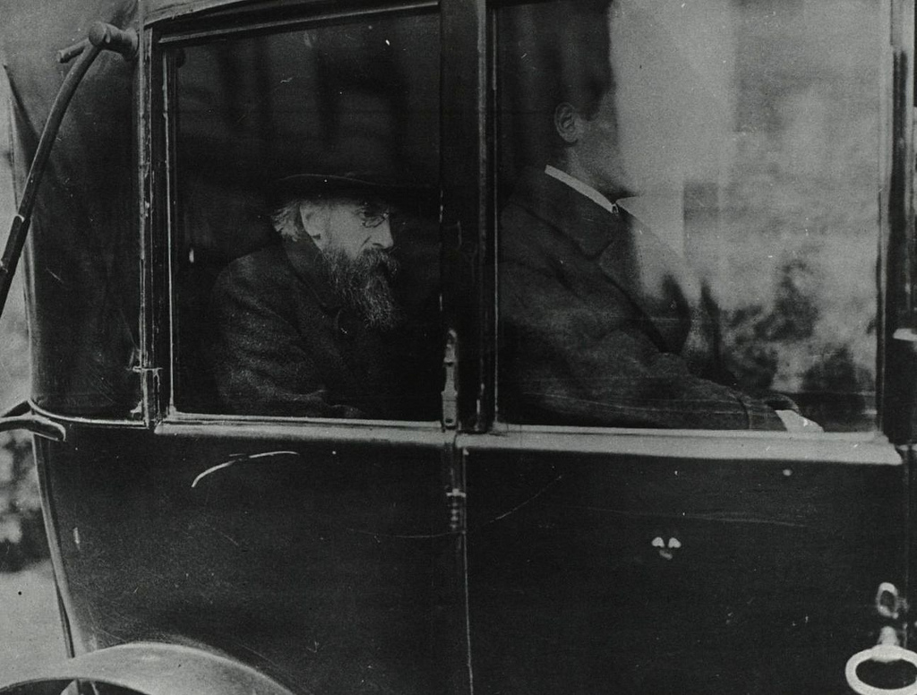 Ministerpräsident Kurt Eisner während der Fahrt zur Reichskanzlei anläßlich der Reichskonferenz der Bundesdeutschen Regierung in Berlin, 22. November 1918.